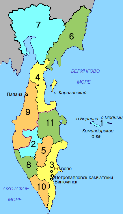 Административно-территориальное деление Камчатского края